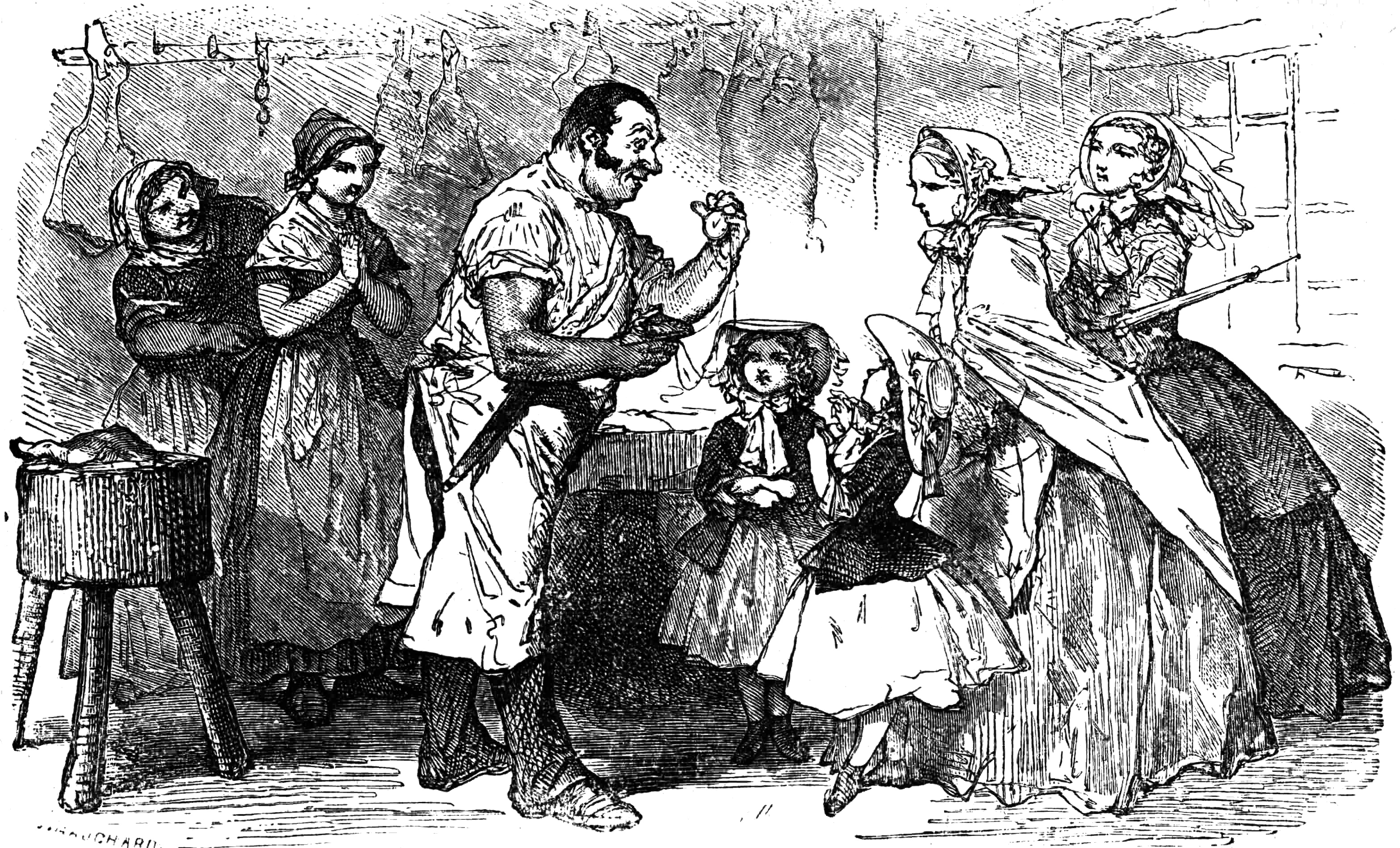 « Il s'arrêta muet de bohneur à la vue d'une belle montre. » Illustration contenue dans le roman de (wikipedia-FR) Sophie Rostopchine, comtesse de Ségur, Les Petites Filles modèles, (wikisource-FR) Chapitre XXIV : Visite chez Hurel.